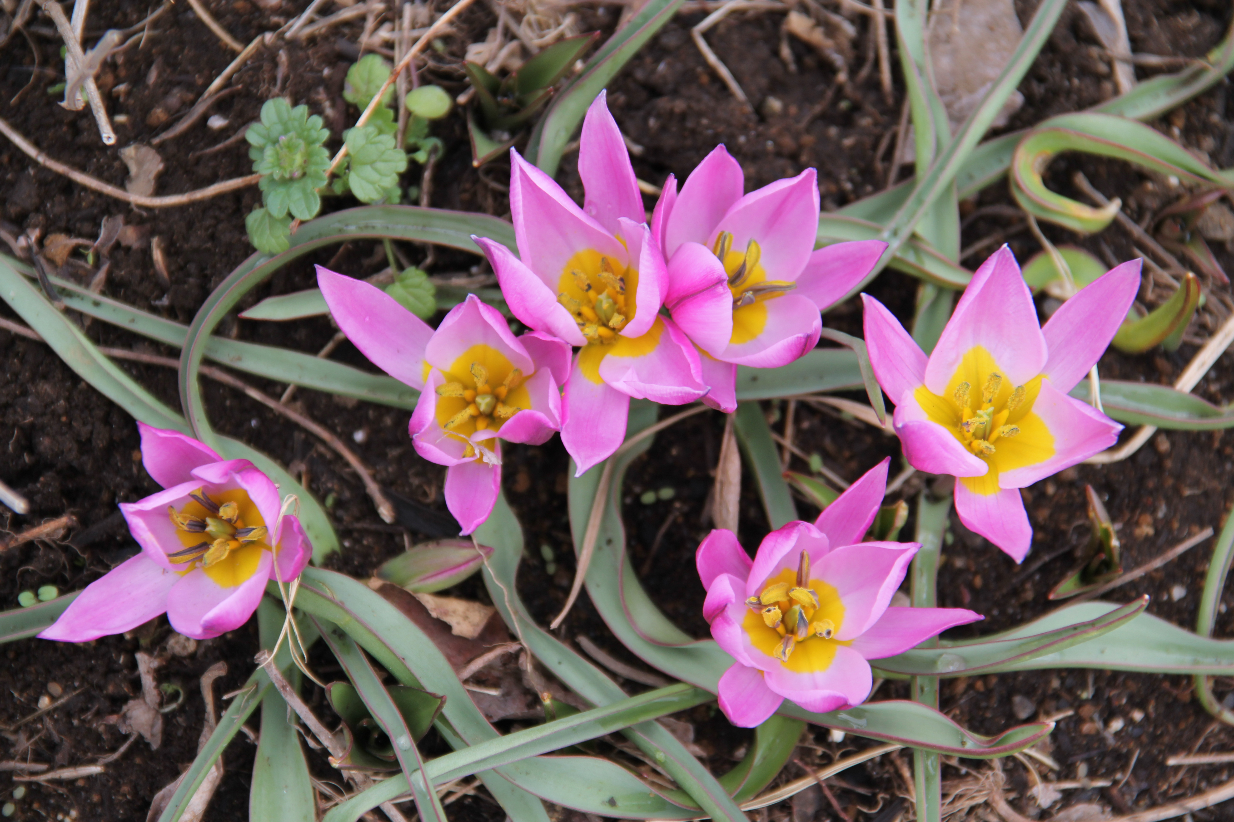 لاله ریزه